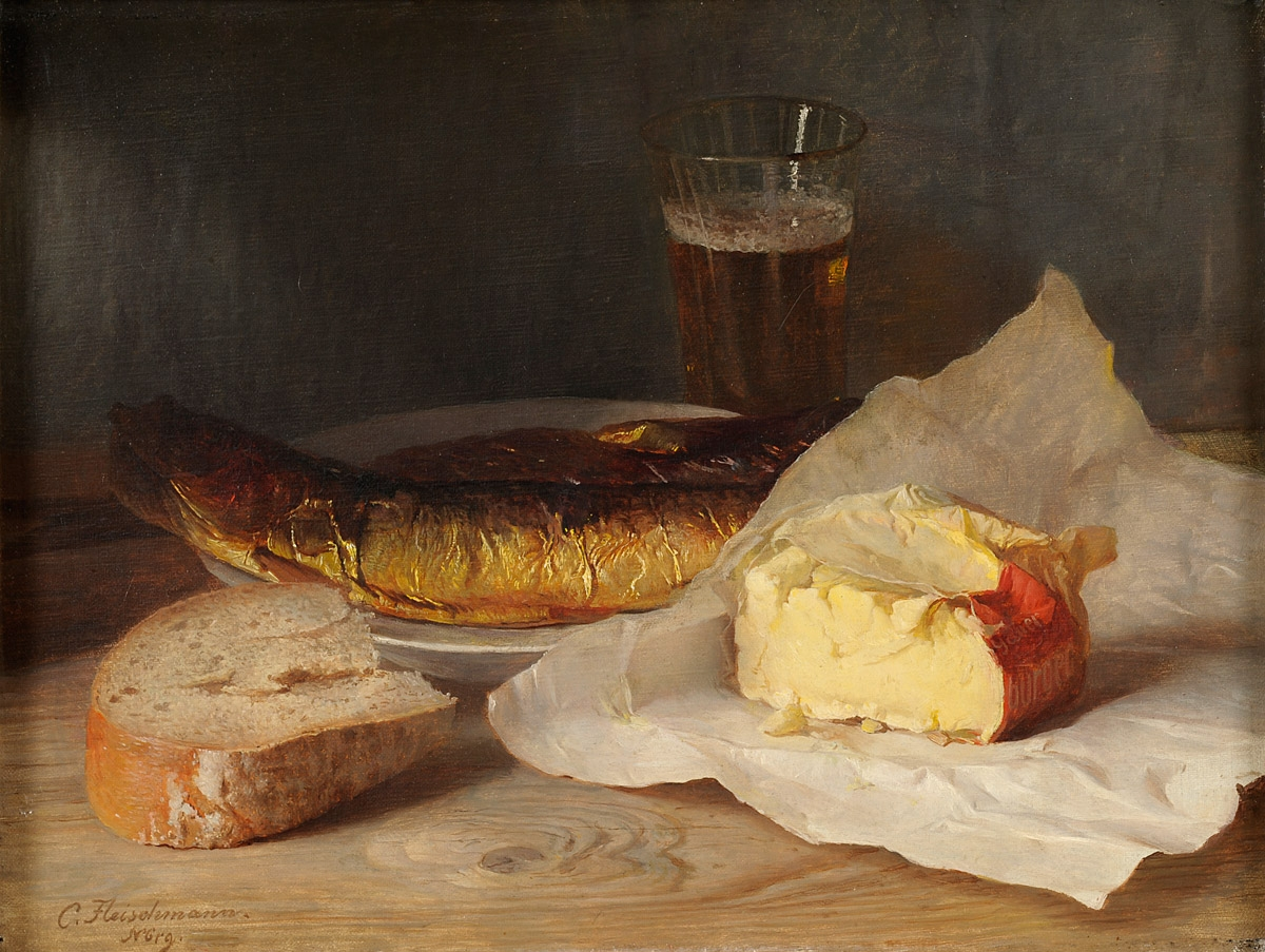 Stilleben mit Fisch, Käse und Brot. Signiert. Öl auf Leinwand, 22.5 x 33.5 cm